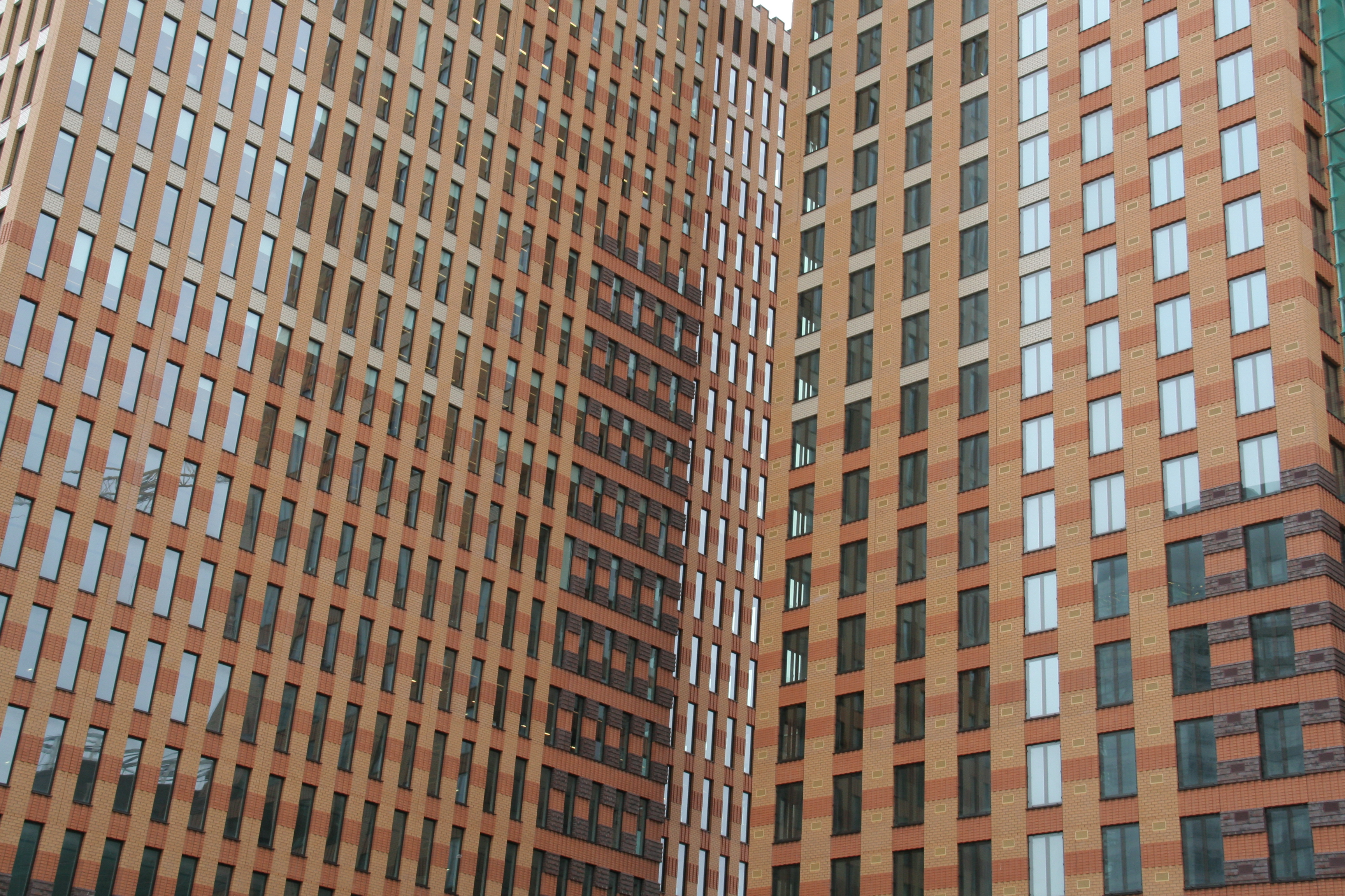 Woningbouw op de Zuidas, Amsterdam.